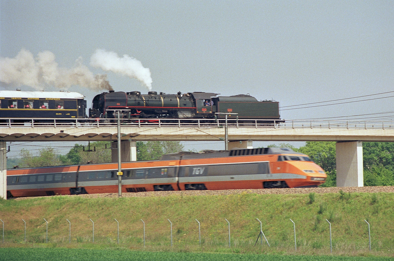 Croisement entre un TGV Sud-Est et un train à vapeur à proximité de Montereau (sur le territoire de la commune de Saint-Germain-Laval) le 24 mai 1987.